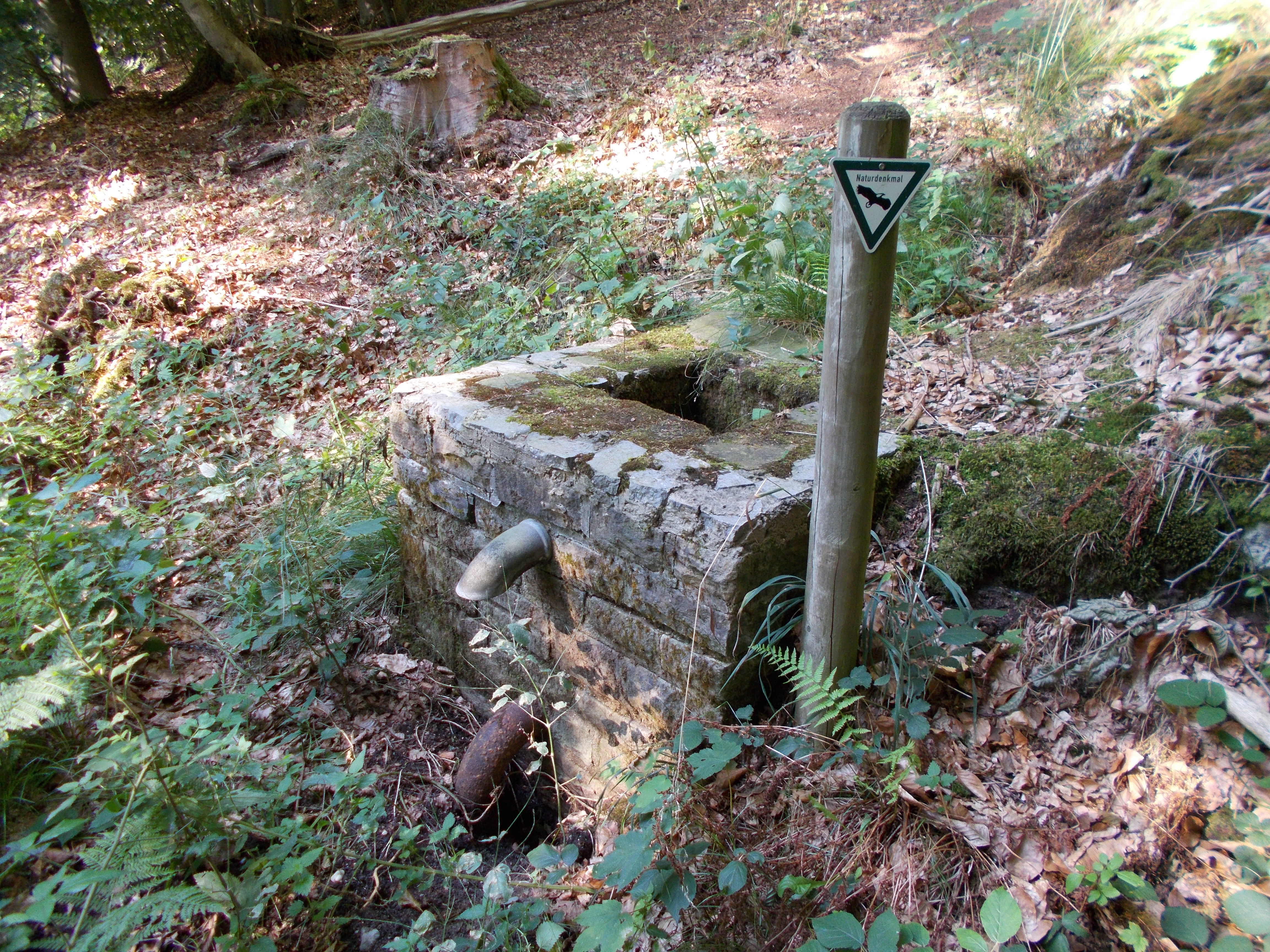 Überlaufbecken Naturdenkmal "Drususquelle" am Hang des Flirenberges in der Hees, ND 4 Sonsbeck / Xanten (Kreis Wesel).